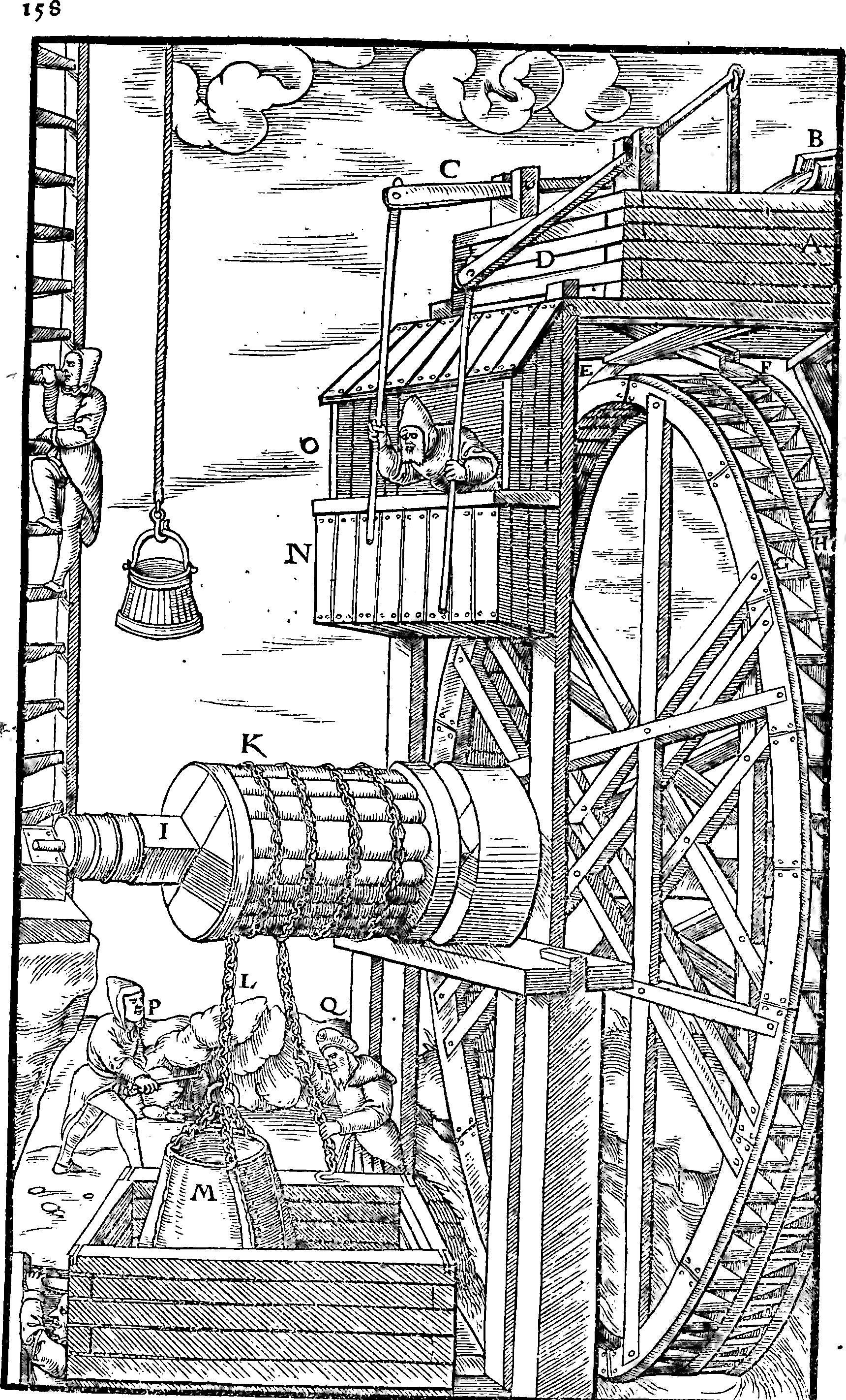 Incisione da De re metallica di Georg Agricola, Basilea, 1556